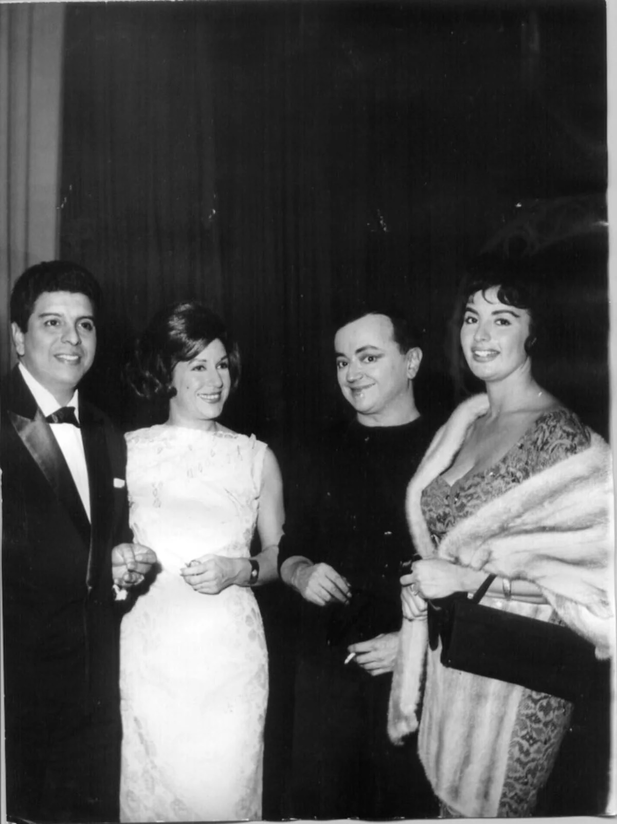 Isabel Sarli, Paco Jamandreu, Aida Denis y Argentino Ledesma en 1962.